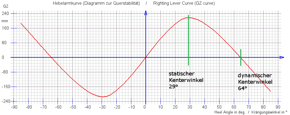 Kurve des aufrichtenden Hebels eines Bootes (GZ-Kurve) mit statischem und dynamischem Kenterwinkel